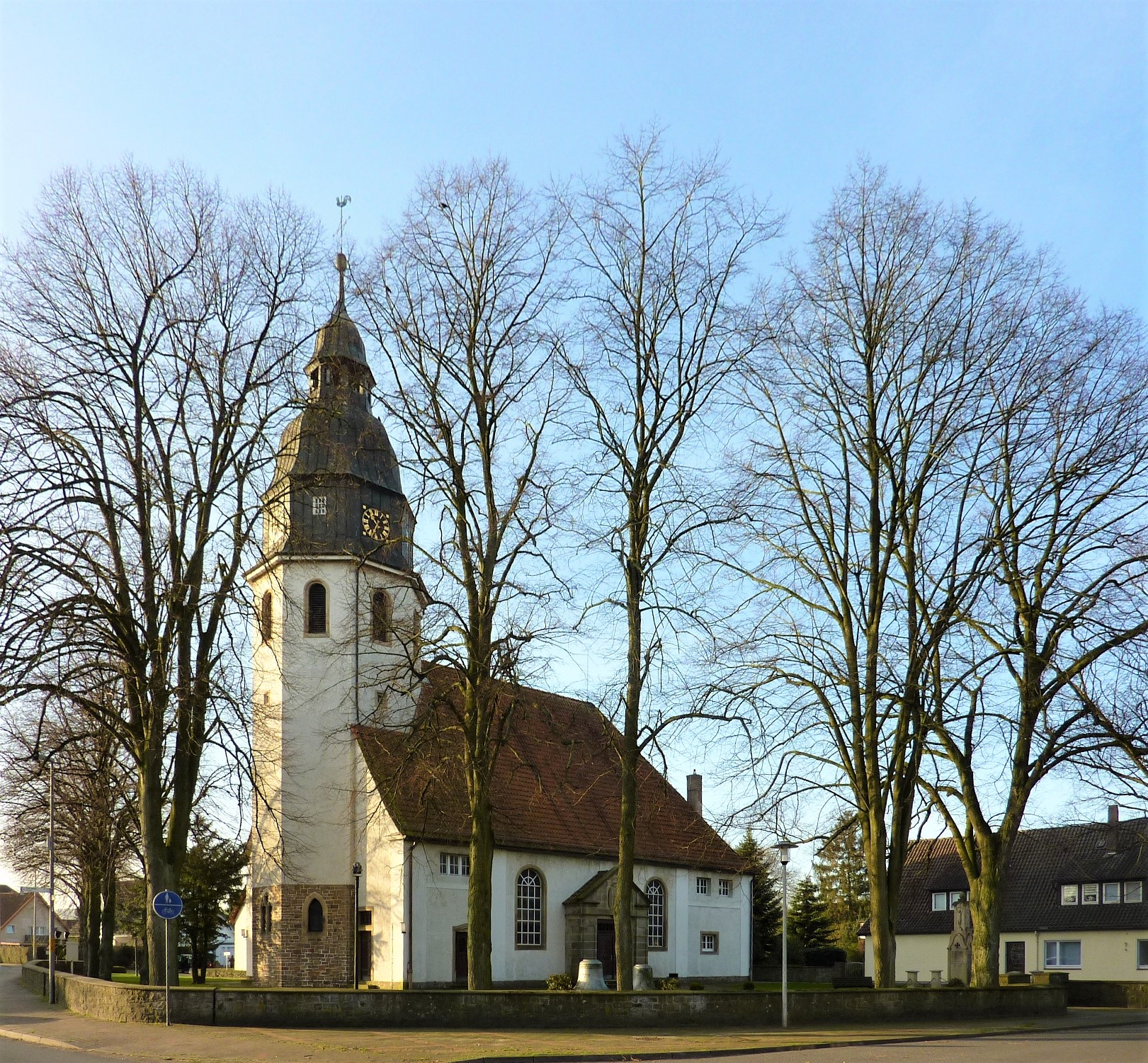 St. Marien (Bad Essen-Rabber)